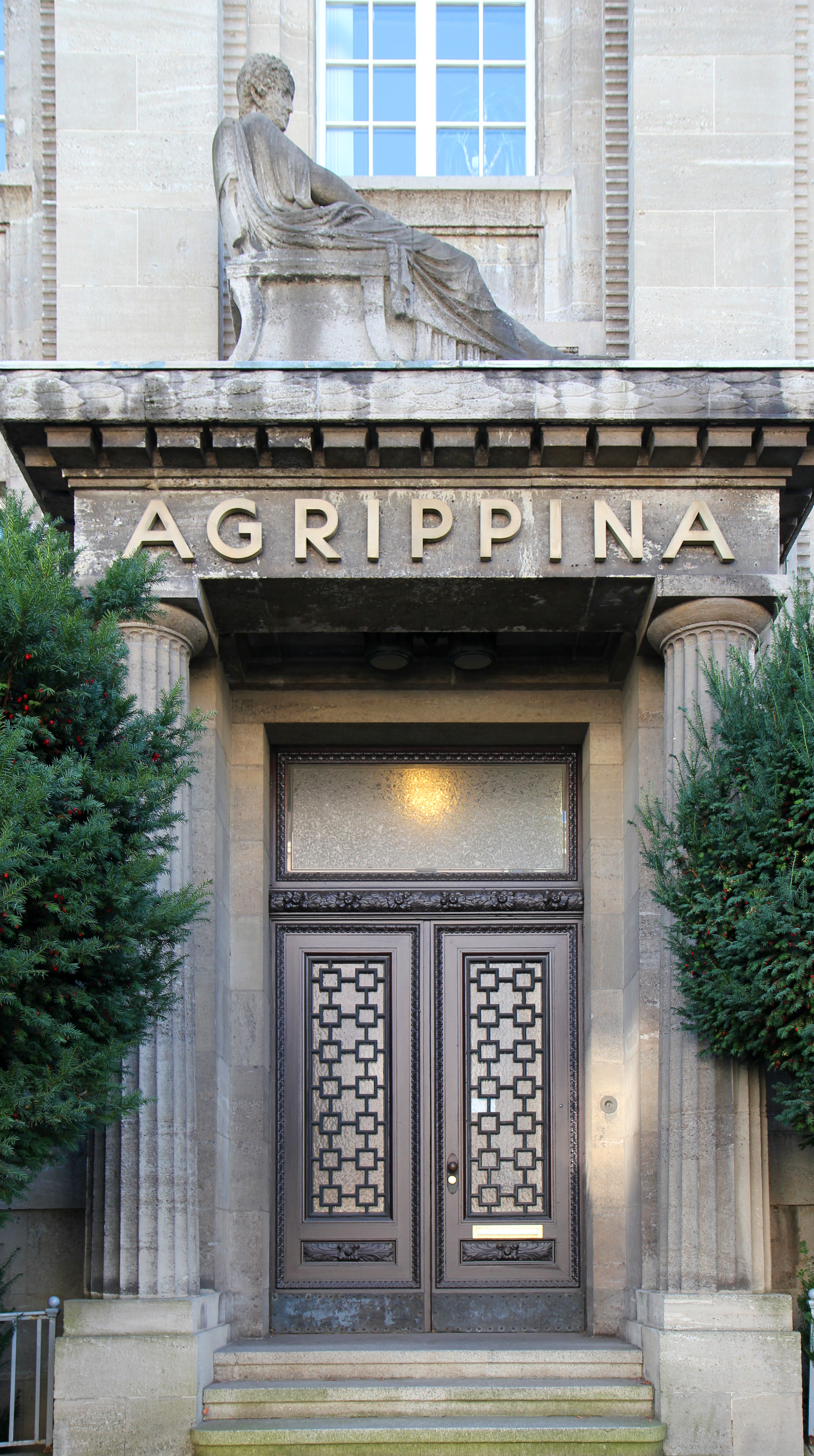 Agrippina-Versicherung, Köln Neustadt-Nord, Portal Riehler Straße 90